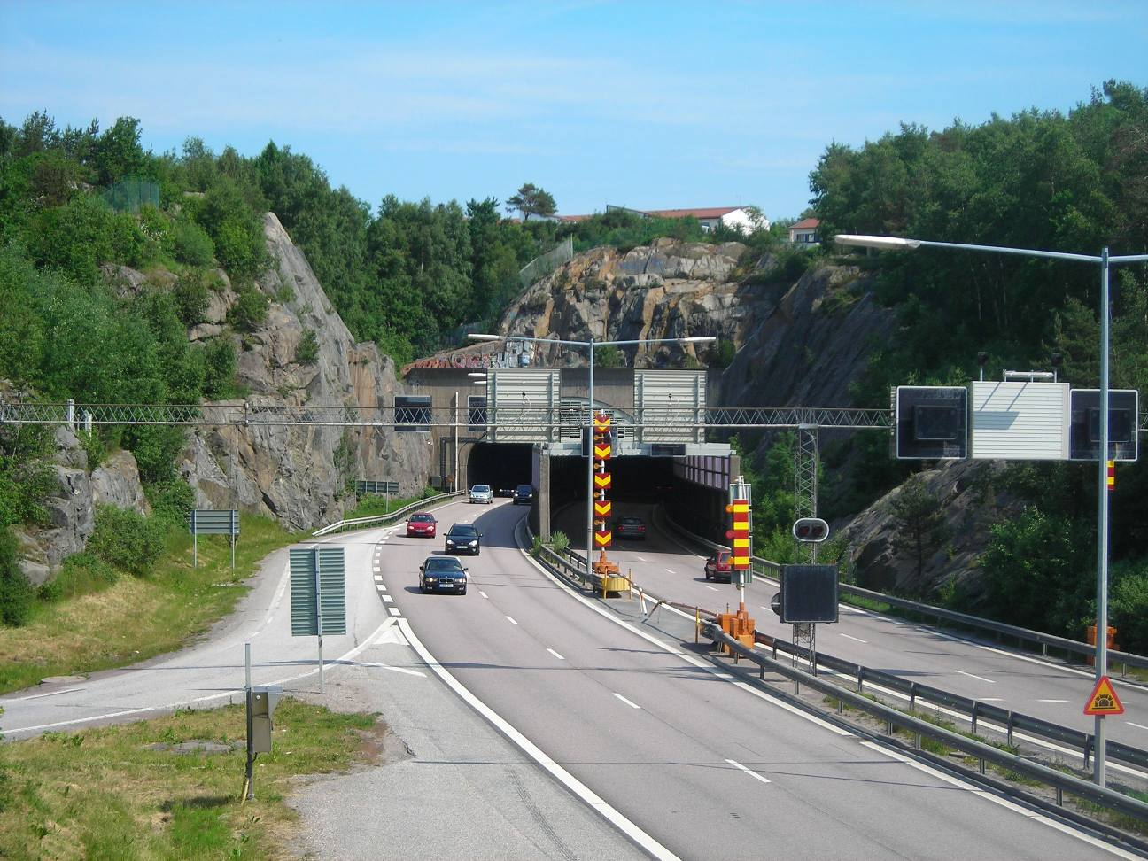 The tunnel Gnistängstunneln, in Gothenburg, Sweden